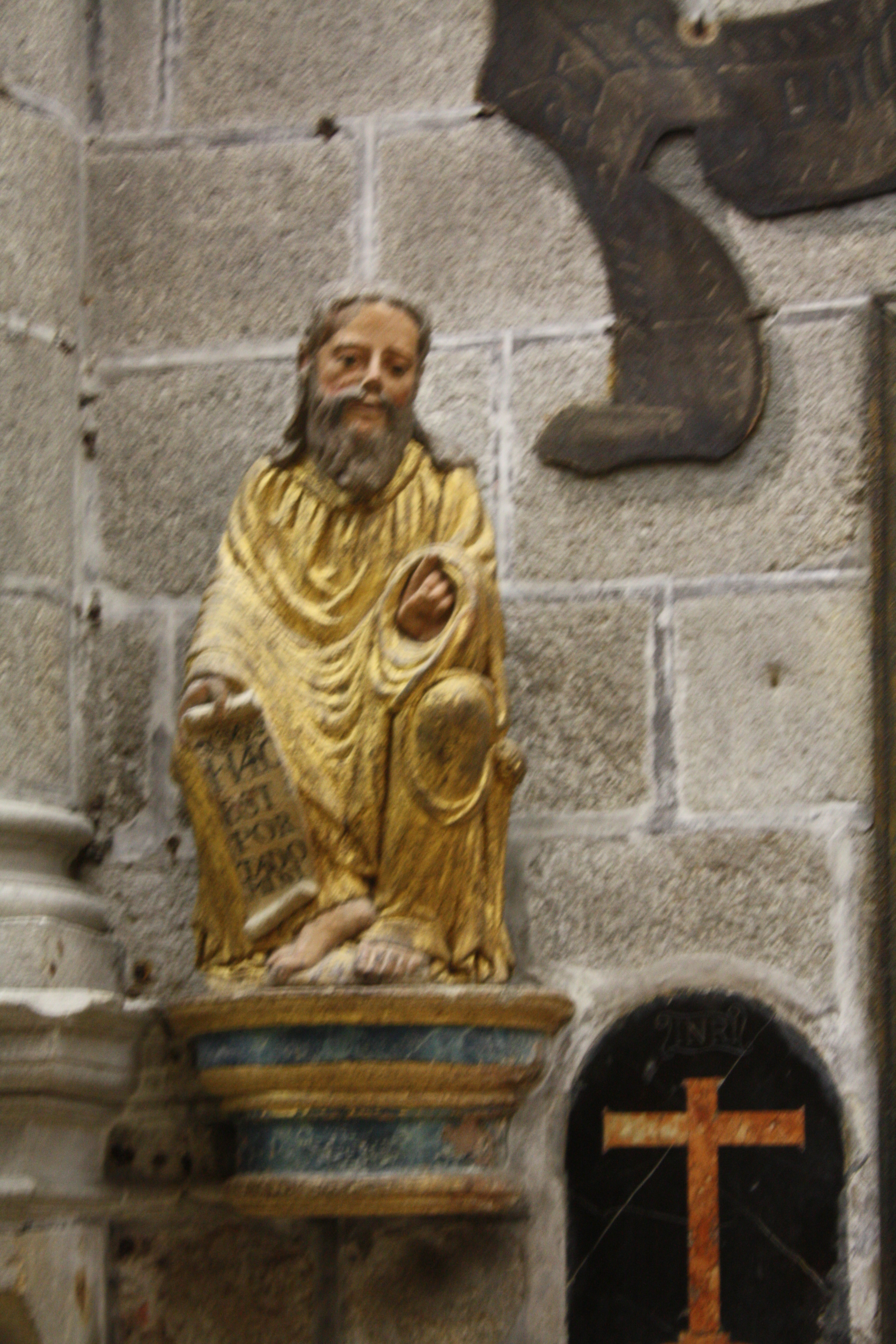 San Xudas Tadeo, no interior da Porta Santa da Catedral de Santiago de Compostela.